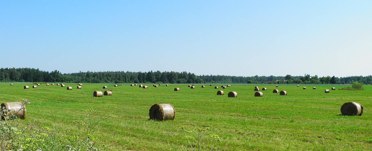 поле